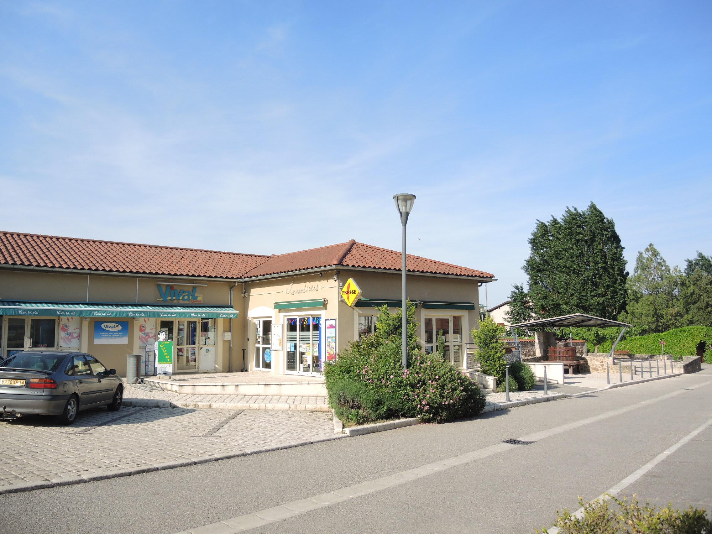 Limony détail